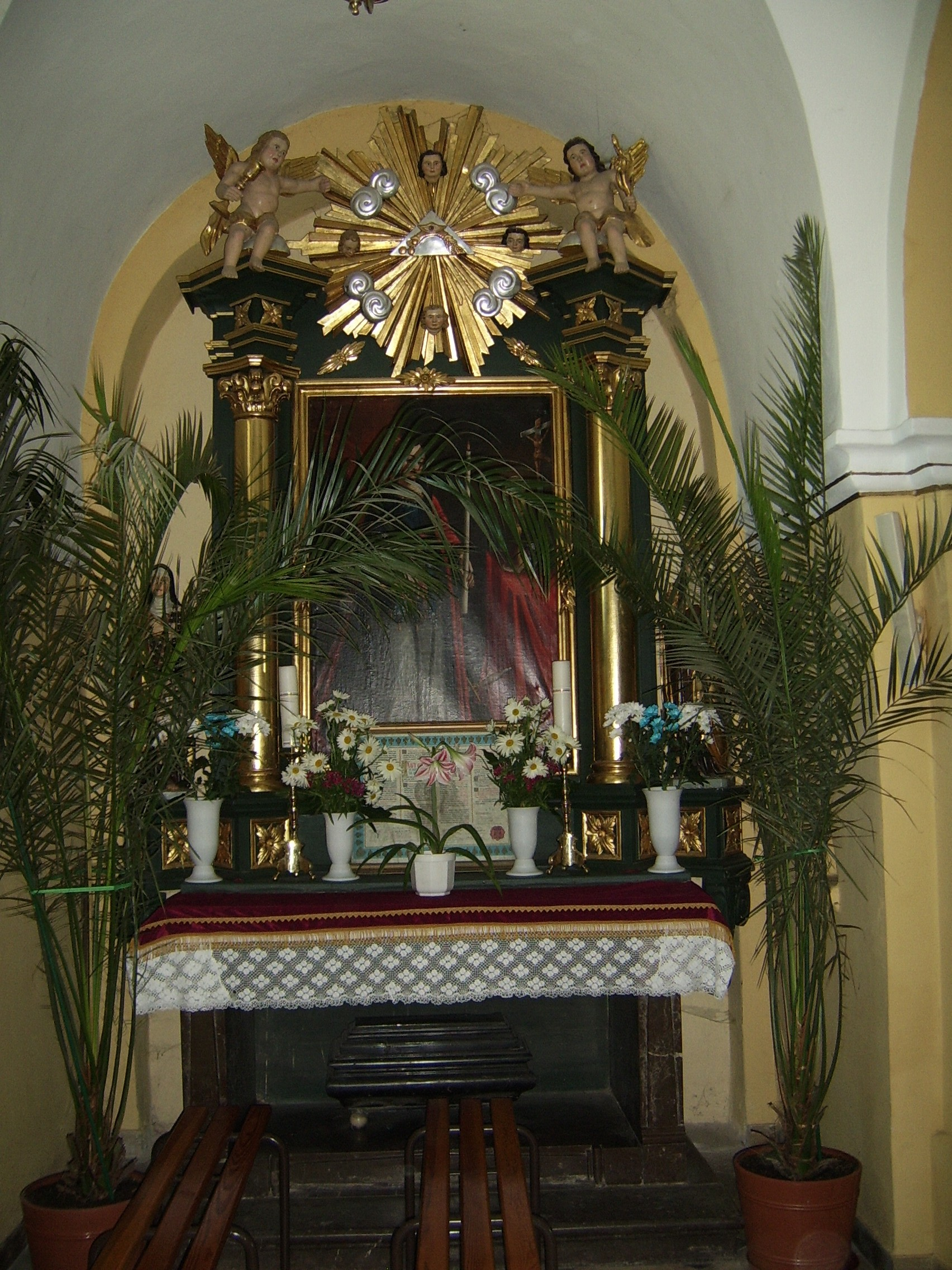 Kościelec (województwo małopolskie) - kościół pw. św. Wojciecha, ołtarz boczny północny, barokowy z I połowy XVIII wieku z obrazem św. Barbary z 1672 roku.